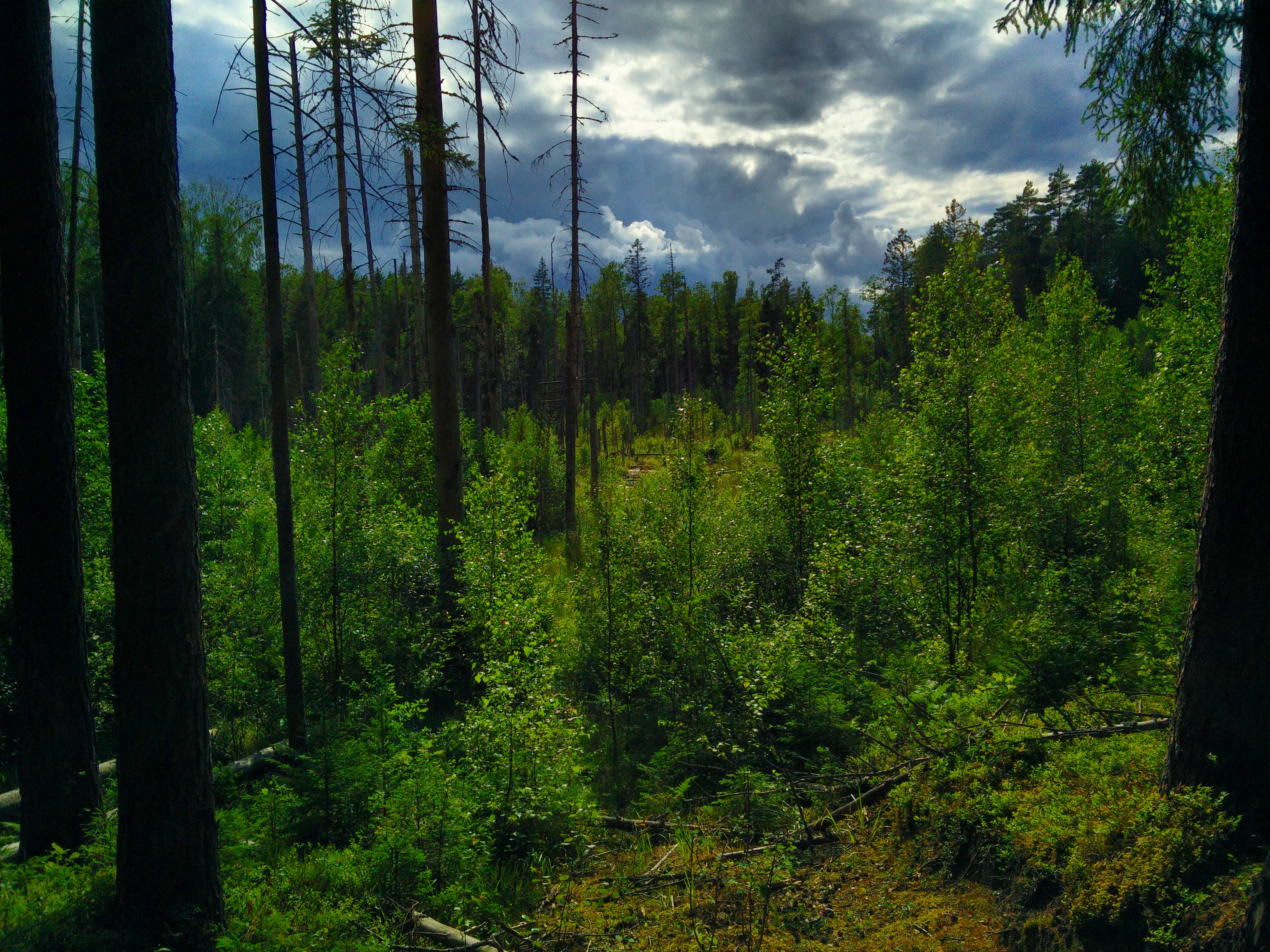 Skog vid Jaunjelgava.